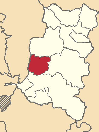 Mapa localizacor del cantón en Chimborazo, Ecuador